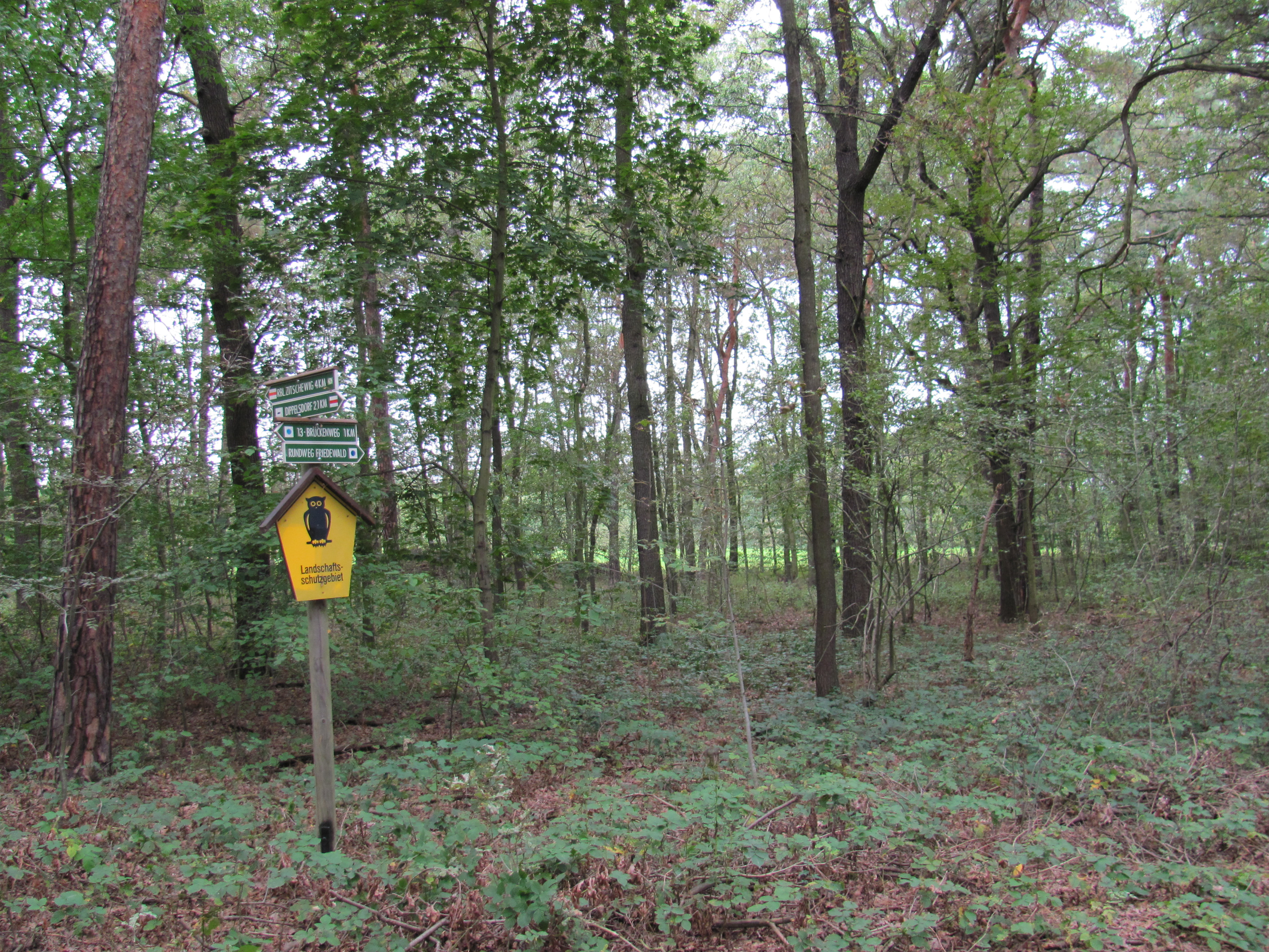 Radebeul LSG Lößnitz, Standort am FND Buchholzwiese Lindenau